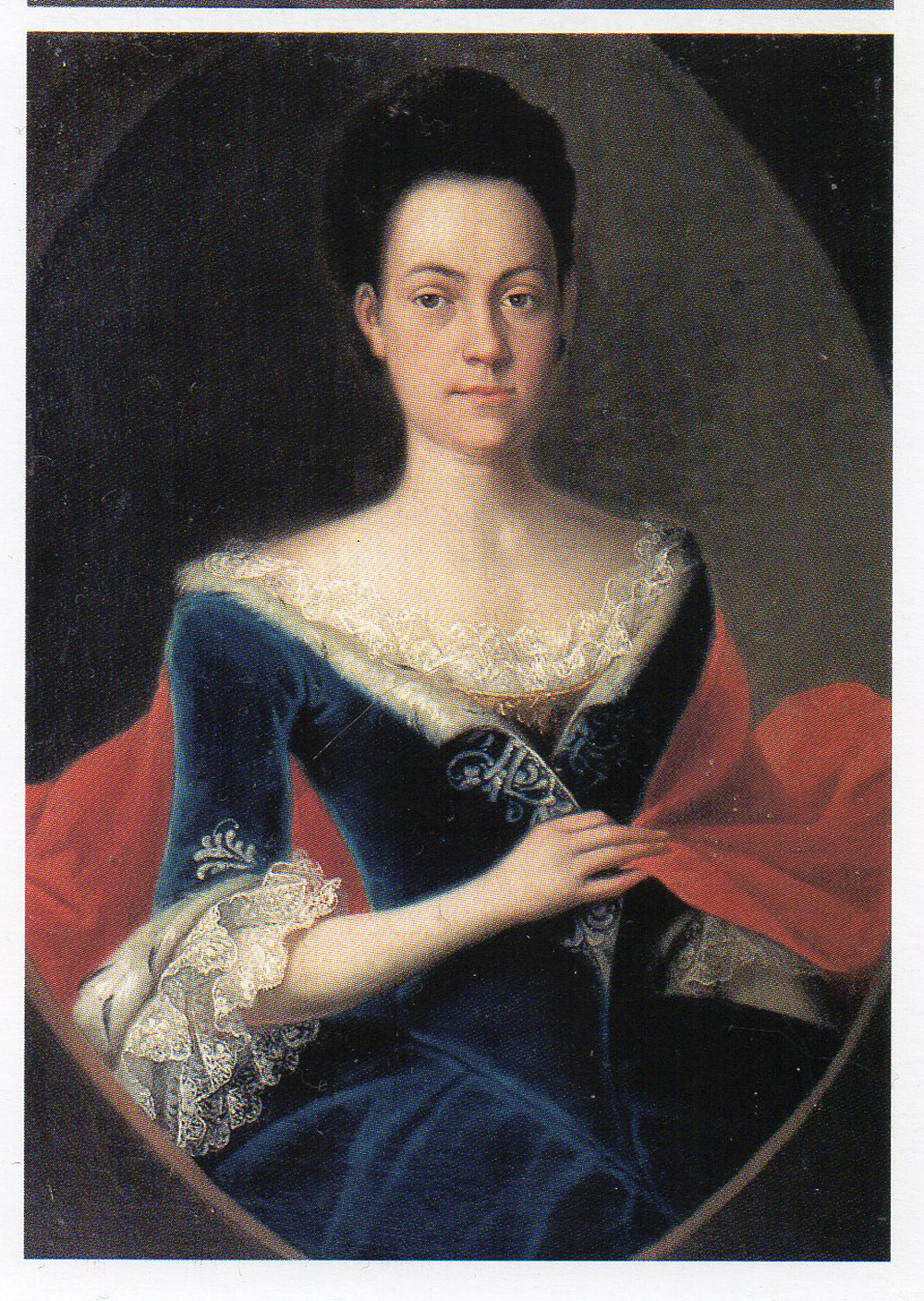 Elisabeth Gräfin Hendl-Goldrain